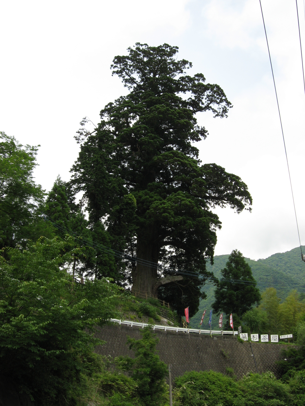 神奈川県山北町の箒杉 (Hokisugi)